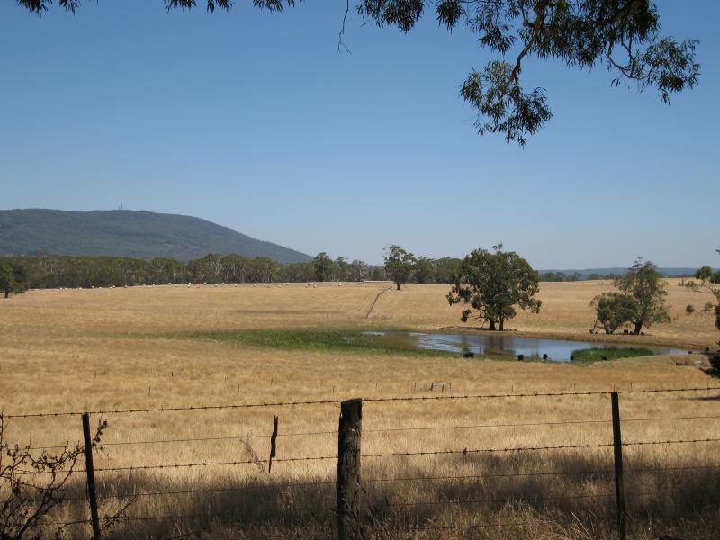 Photo taken on jims road